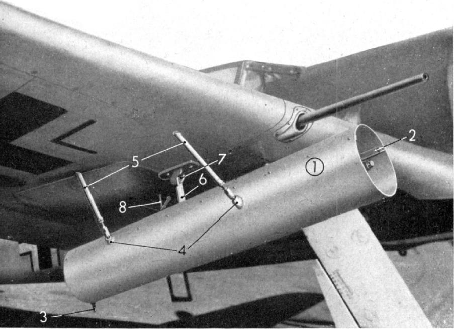 Focke Wulf 190 mit 21cm Wurfgranate 42 Details der Aufhängung und Mechanismus